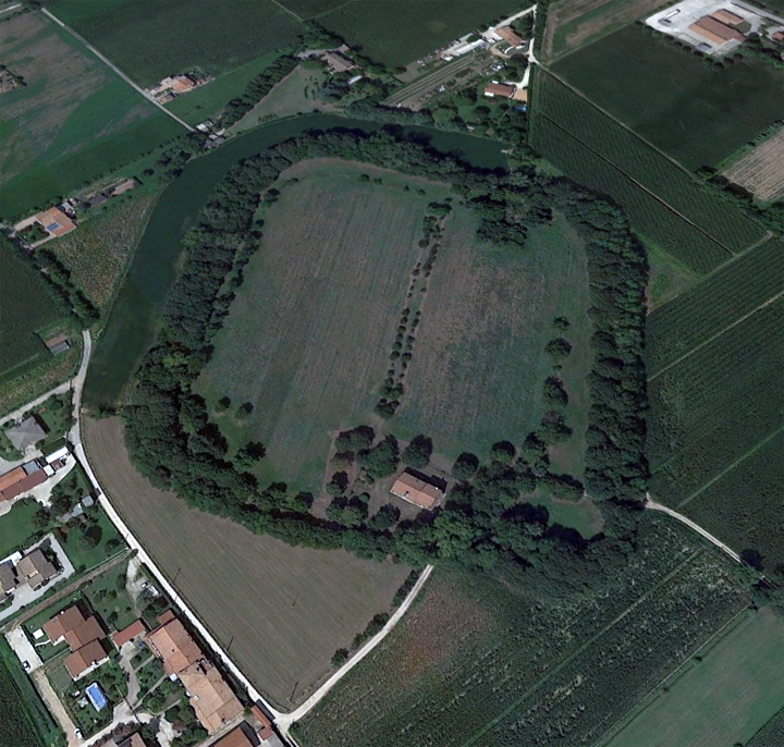 Villaggio fortificato dell'età del Bronzo nei pressi di Castello di Godego (TV). Possiede un perimetro di forma quadrangolare lungo ca. 230 × 240 m per un totale di ca. 55.680 mq. alto in media 4 metri. L’area interna è un po' sopraelevata rispetto al piano di campagna. Vèneto: Vilajo fortifegà de l'età del Bronzo visin a Castelo de Godego (TV). Ga on perimetro de forma quadrangolare longo ca. 230 × 240 m par on totale de ca. 55.680 mq. e alto in media 4 metri. La parte interna xè on po' sopraelevà rispeto al piano de canpagna.